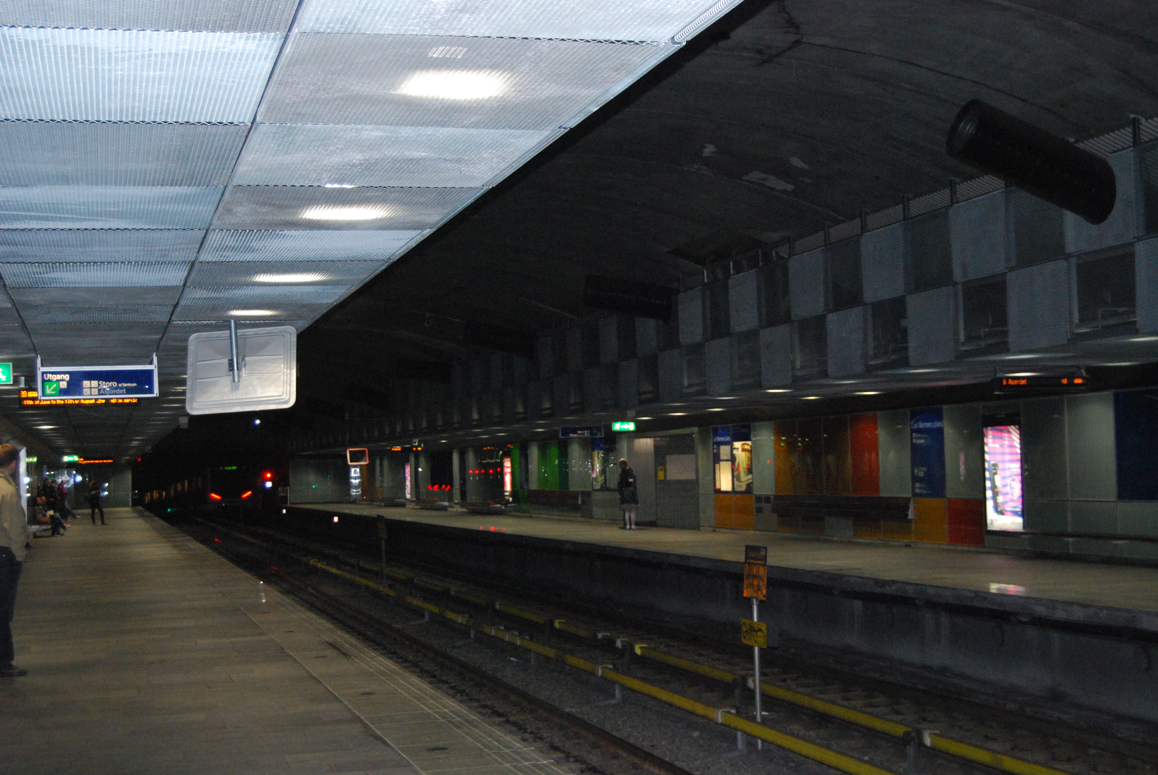 Carl Berners plass stasjon (Oslo stacja metra) 2009 r.